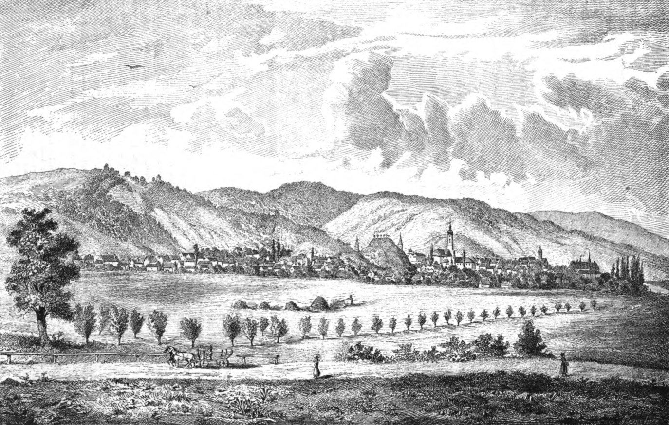 Požega